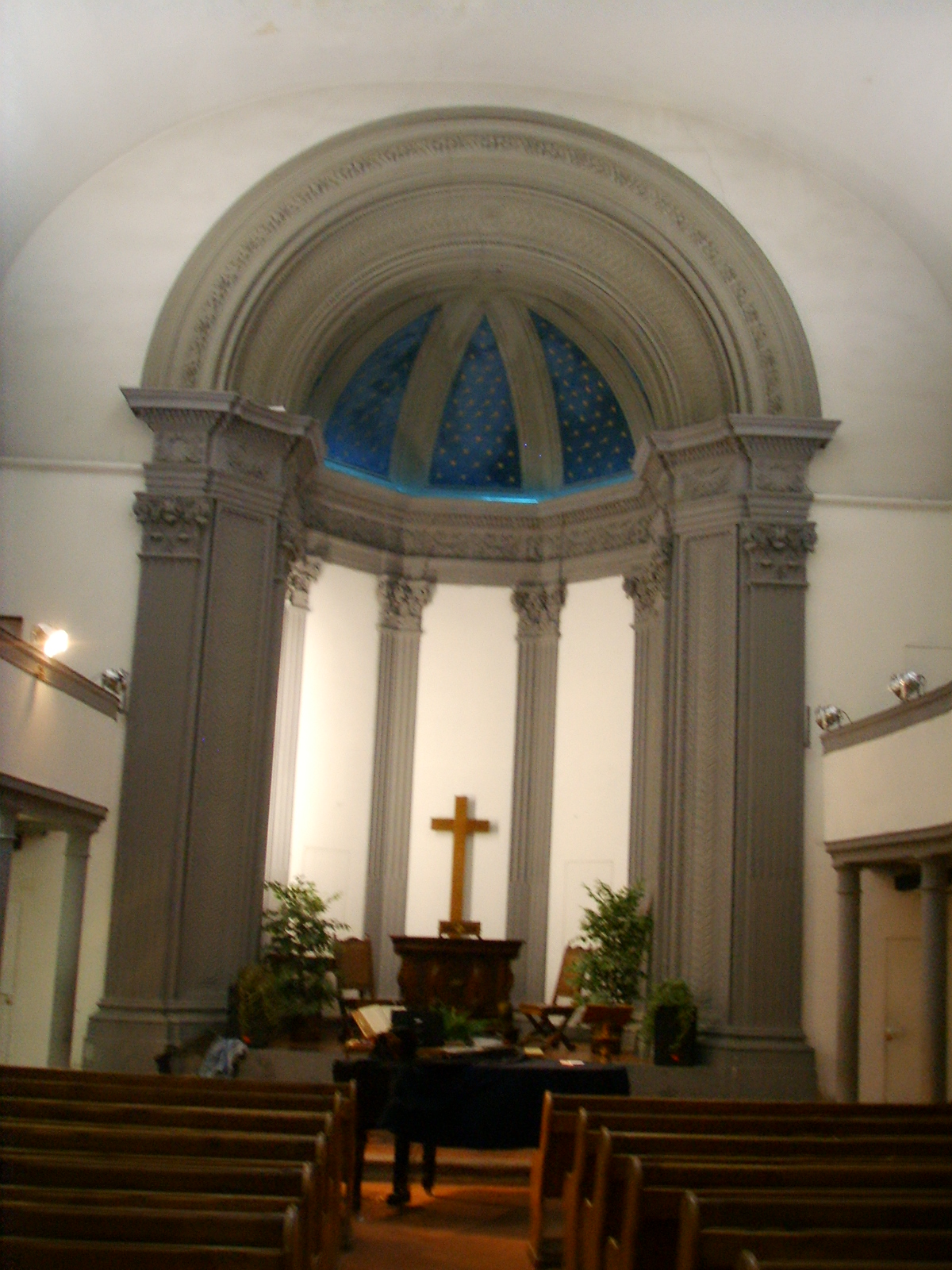 Chiesa Evangelica Battista (Florence) interno